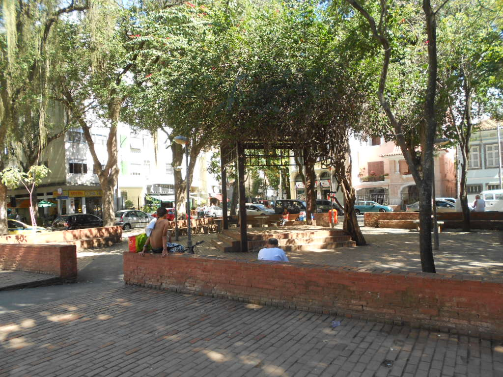 Vista da Praça São Salvador, em Laranjeiras, Rio de Janeiro, Brasil.